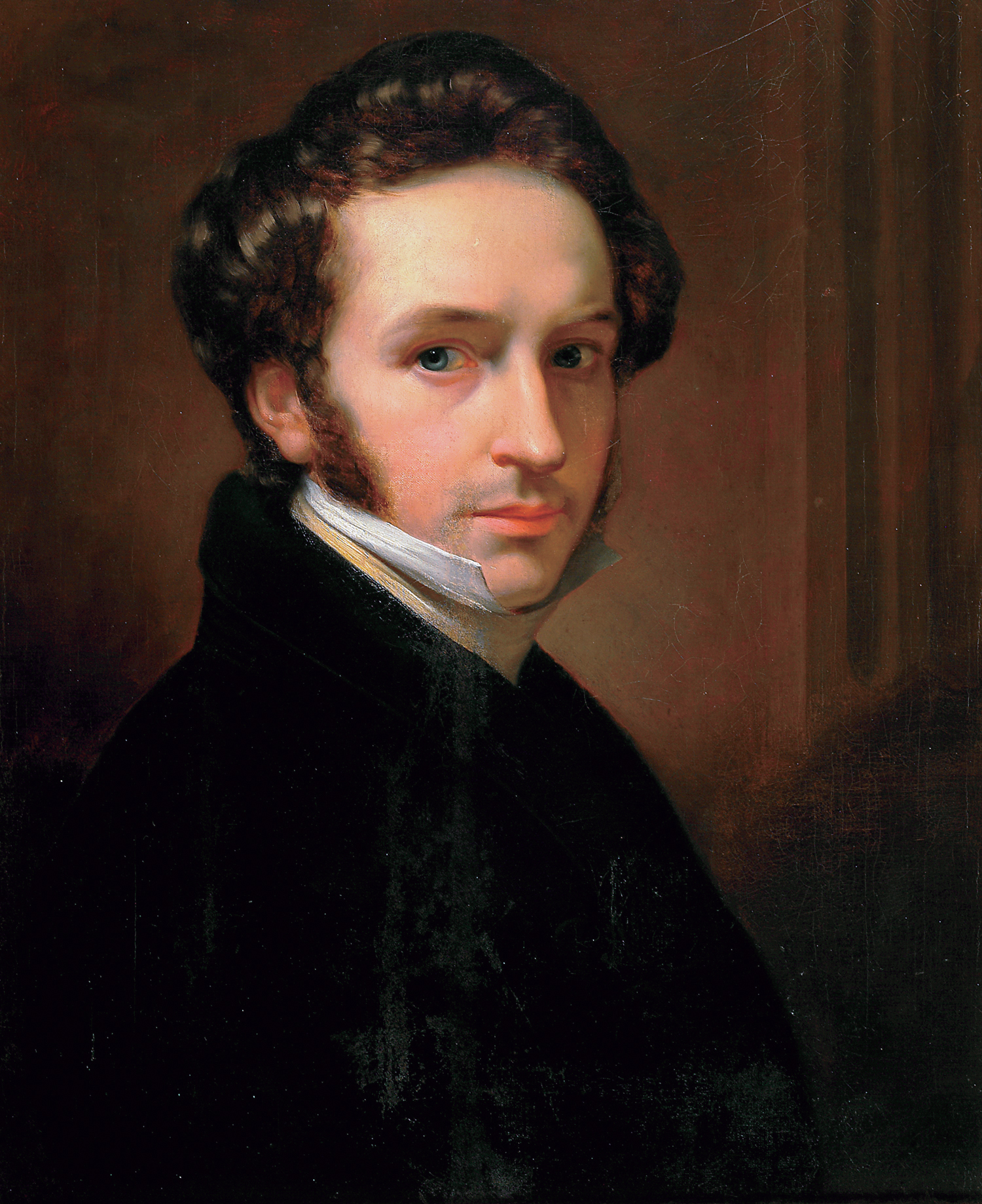 Jan Adam Kruseman